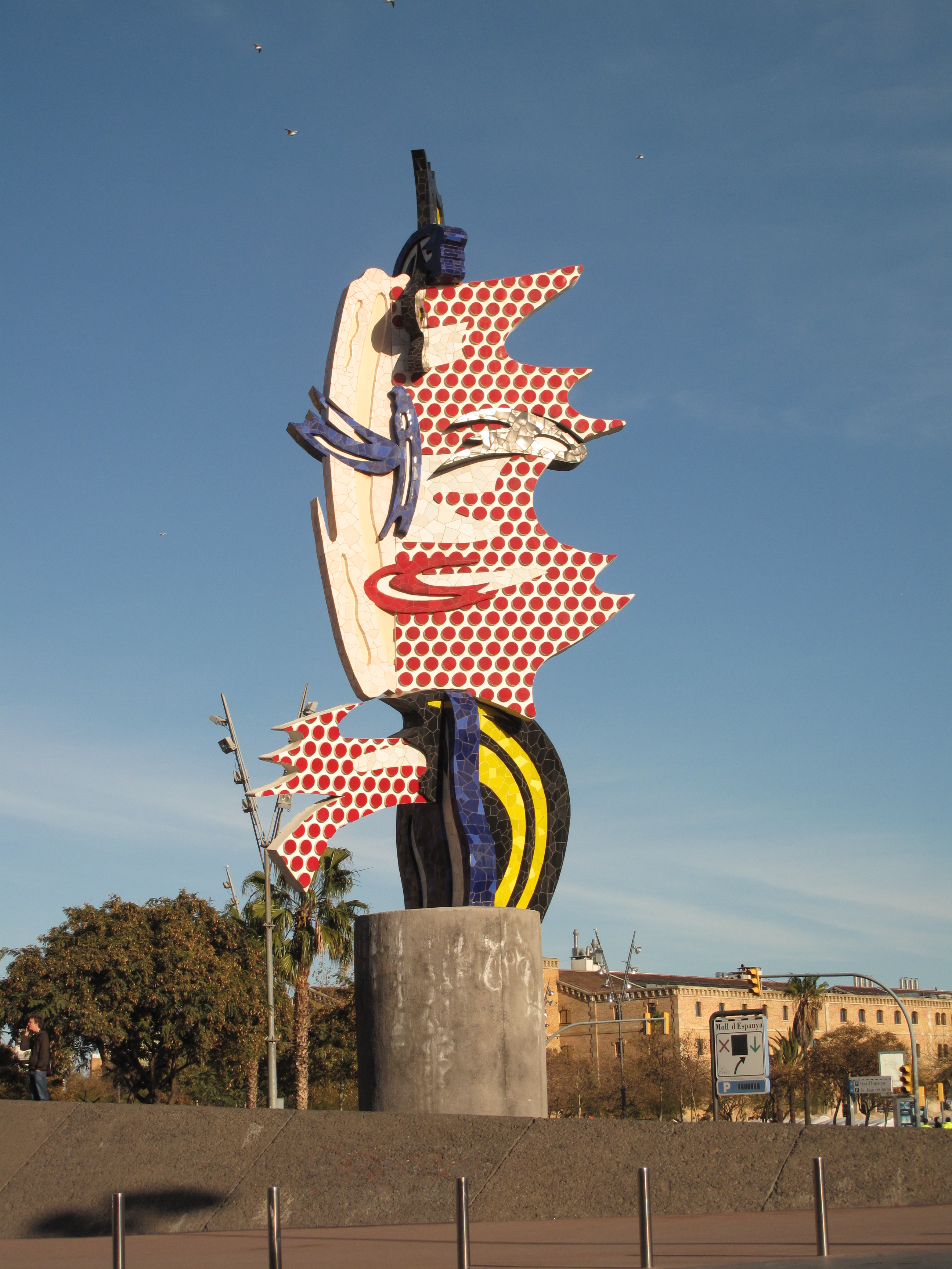 Cap de Barcelona (Roy Lichtenstein). Moll de la Fusta (Barcelona).